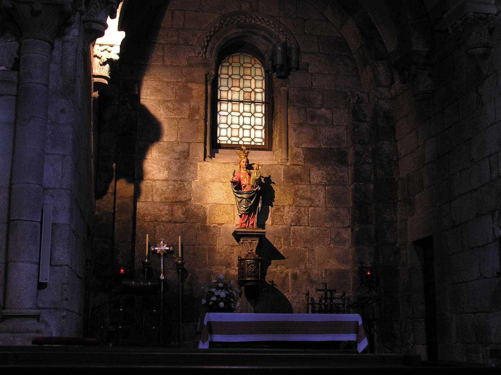 Igrexa da Corticela, Santiago de Compostela. Galicia Publish by= Luis Miguel Bugallo Sánchez. Self made